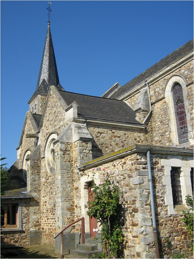 Origné (Mayenne) - Eglise St Etienne